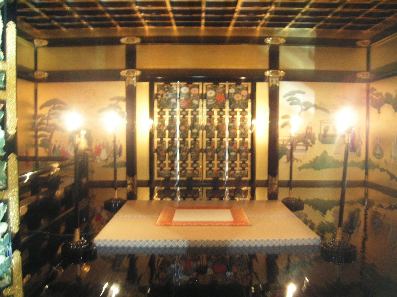 Oda Nobunaga's Yakata(Rebuild Castle), 信長之館(安土城復原後的天守), 信長の館（安土城復元天守）